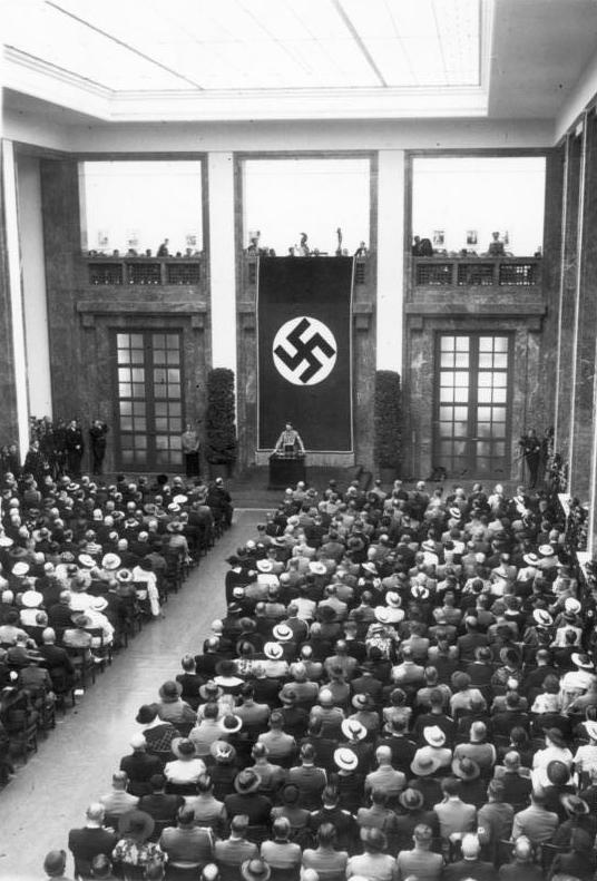 "Haus der Deutschen Kunst" feierlich eingeweiht. Das "Haus der Deutschen Kunst", die neue würdige Heimstätte des deutschen Kunstschaffens, wurde am Sonntagvormittag durch den Führer und Reichskanzler feierlich eingeweiht, und die grosse Deutsche Kunstausstellung 1937 eröffnet. UBz: den Führer und Reichskanzler während seiner Ansprache am Festsaal des "Hauses der Deutschen Kunst". Scherl Bilderdienst, Berlin 18.7.1937